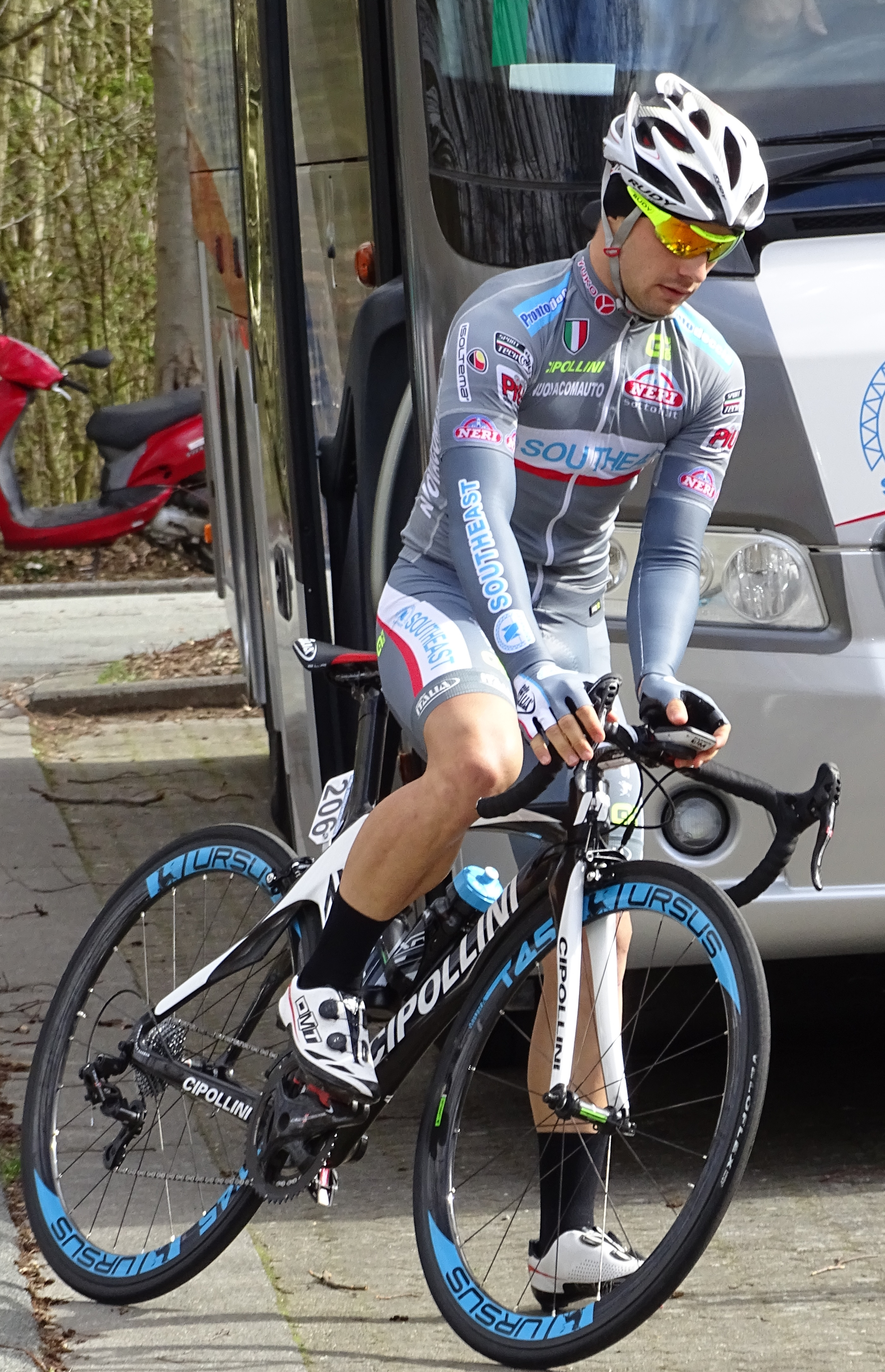 Reportage réalisé le mercredi 1er avril à l'occasion du départ de la deuxième étape des Trois jours de La Panne 2015 à Zottegem, Belgique.